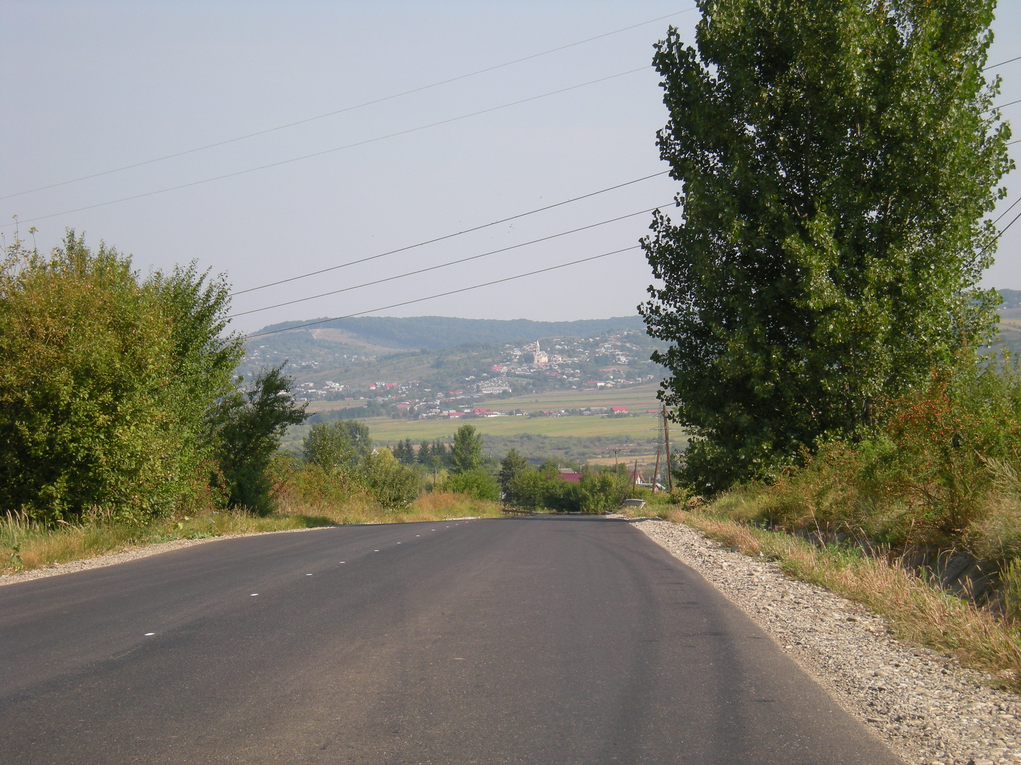 Vedere spre Pustiana, Bacău de pe DJ 156 A Ardeoani, Bacău–Roznov, Neamț.